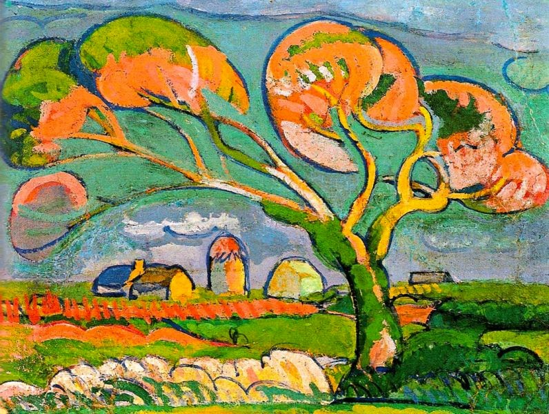 Джино Росси (1884-1947). "Весна в Бретани" (около 1912). Общественный музей Тревизо